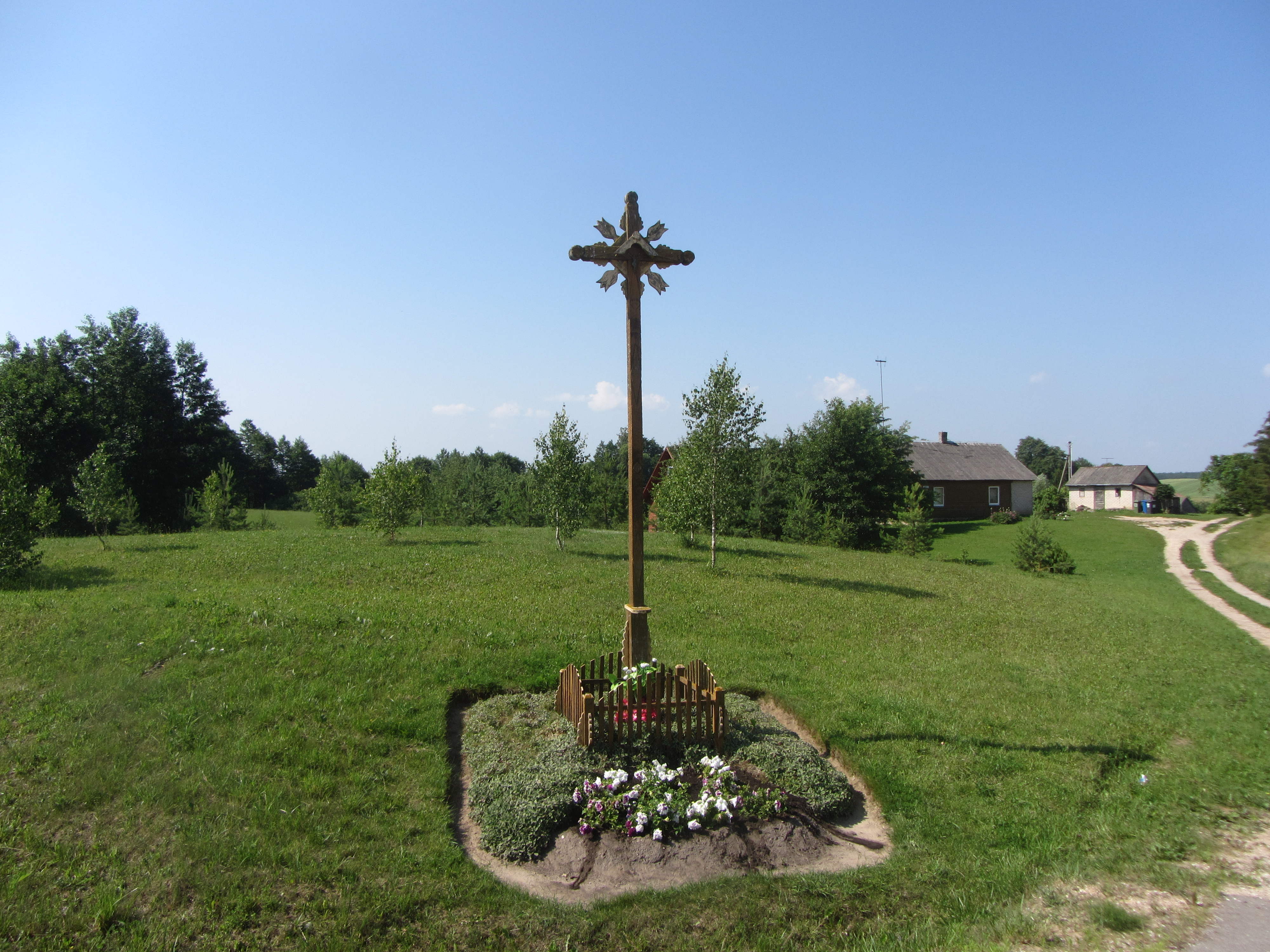 Ežerėliai 67202, Lithuania